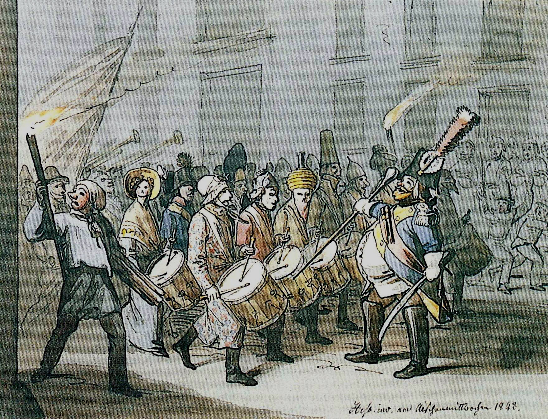 Früheste bekannte Darstellung des «Morgenstreichs», des traditionellen Auftakts zur Basler Fasnacht. Aquarell von Hieronymus Hess (1799-1850). Bildtext: «Hess inv[enit]. am Aschenmittwochen 1843.»